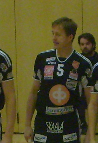 Sami Juvonen kaudella 2008 SM-liigaottelussa